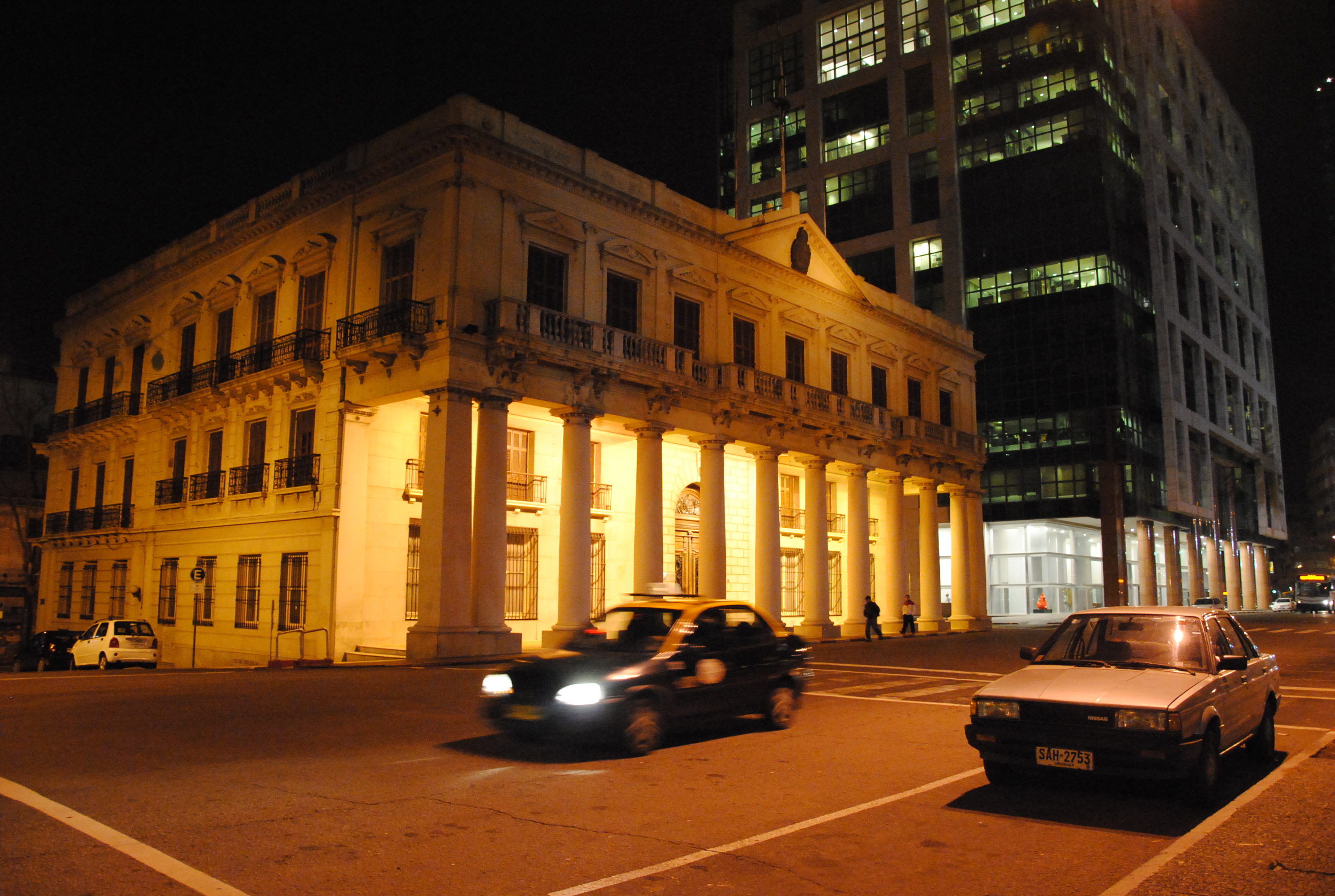 Montevideo, Uruguay.